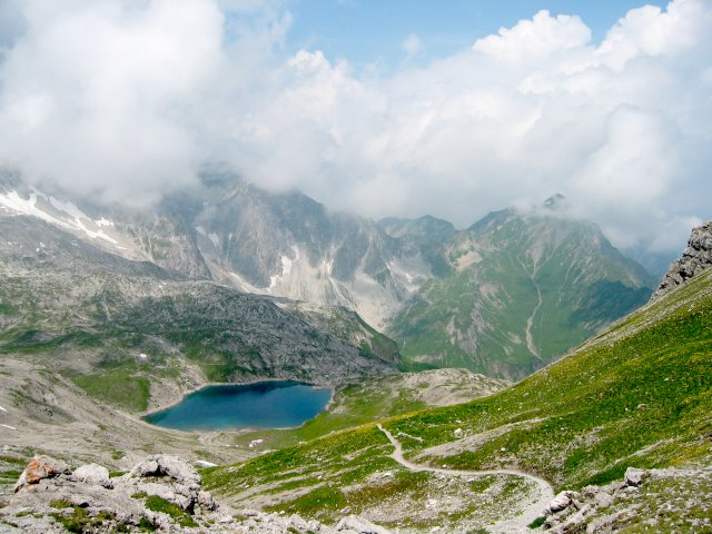 Karsee im Lechquellengebirge